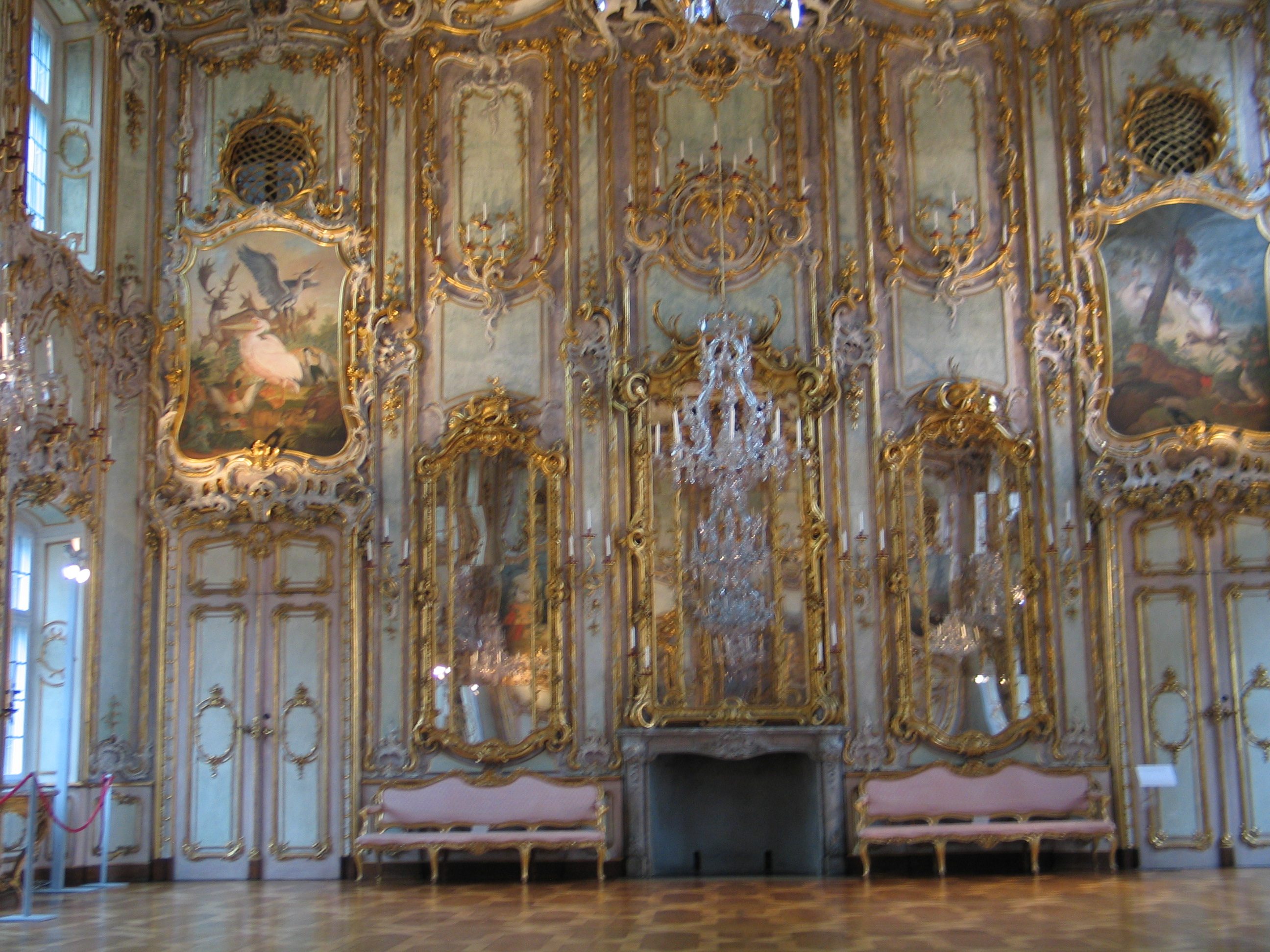 Augsburg, Festsaal im Schaezlerpalais